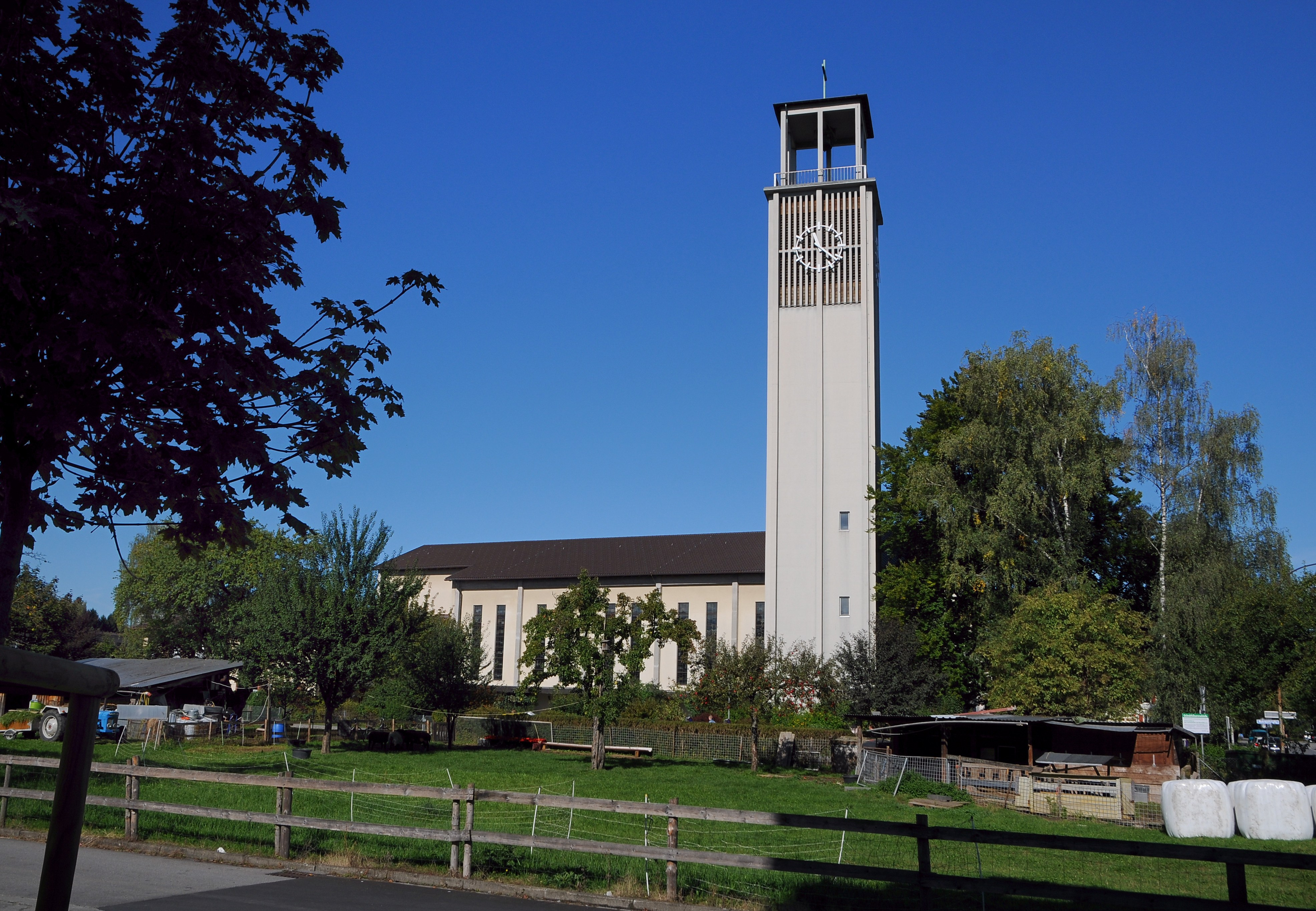 Kath. Pfarrkirche hl. Gebhard in Bregenz Vorkloster, Relativ junger Kirchenbau (1956-1961 nach Plänen von Willibald Braun. Hölzerne Schutzmantelmadonna und Hl. Josef von Emil Gehrer über den Seitenaltären; Orgel (1975) von Herbert Gollini; Glasfenster (1959) von Fritz Krcal, Ausführung Tiroler Glasmalereianstalt. Bei Umbau und Restaurierung 2010/2011 Altar ins Hauptschiff verlegt und freigewordene Apsis zu einem Werktagsgottesdienstraum umgewandelt. Optische Trennung im oberen Bereich durch Triptychon „Das bewegliche St. Gebhardsbild“ von Hubert Berchtold (einst für den Burghof auf dem Gebhardsberg gefertigt).